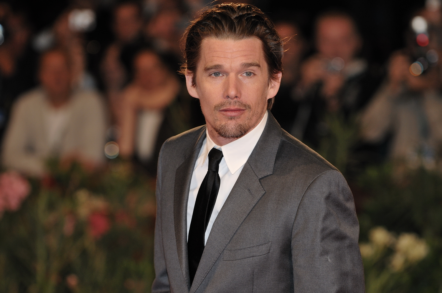 66ème Festival du Cinéma de Venise (Mostra), 8ème jour (07/09/2009) Tapis rouge avec Ethan Hawke et Wesley Snipes et le réalisateur Antoine Fuqua pour le film : Brooklyn's finest